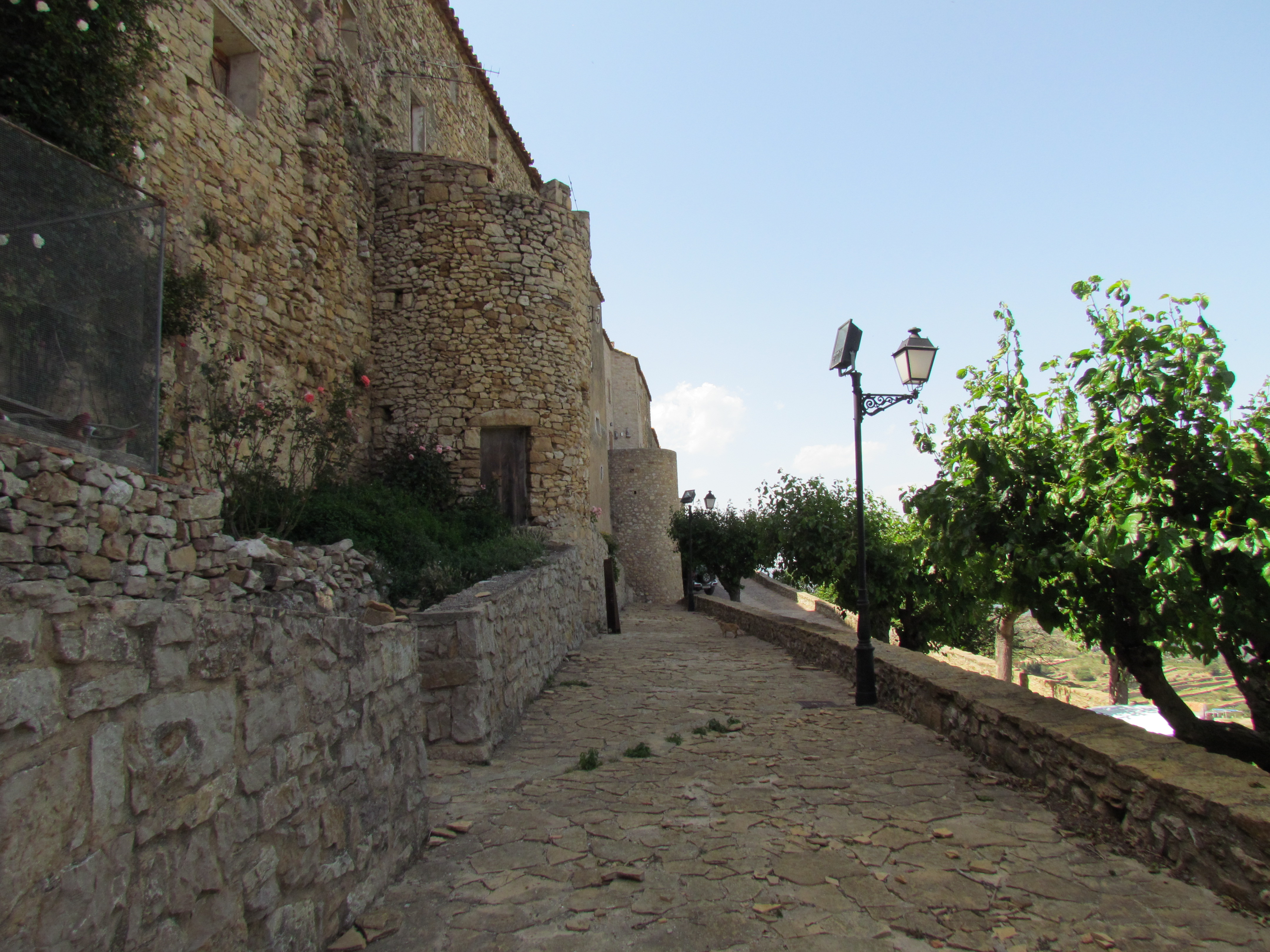 Restes de la muralla que envoltava Culla, Alt Maestrat (País Valèncià)